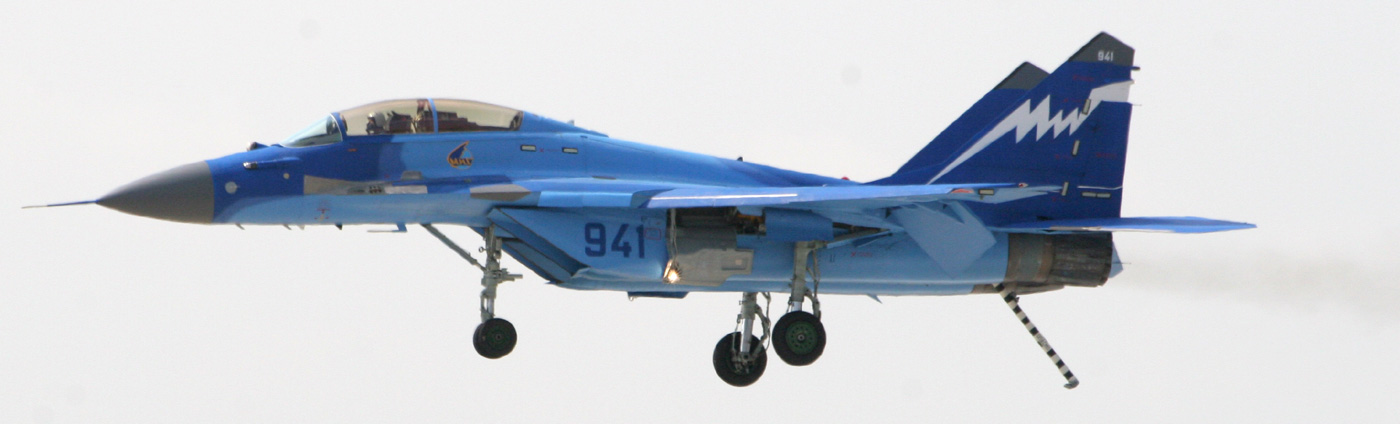 Самолёт МиГ-29К на МАКС-2007